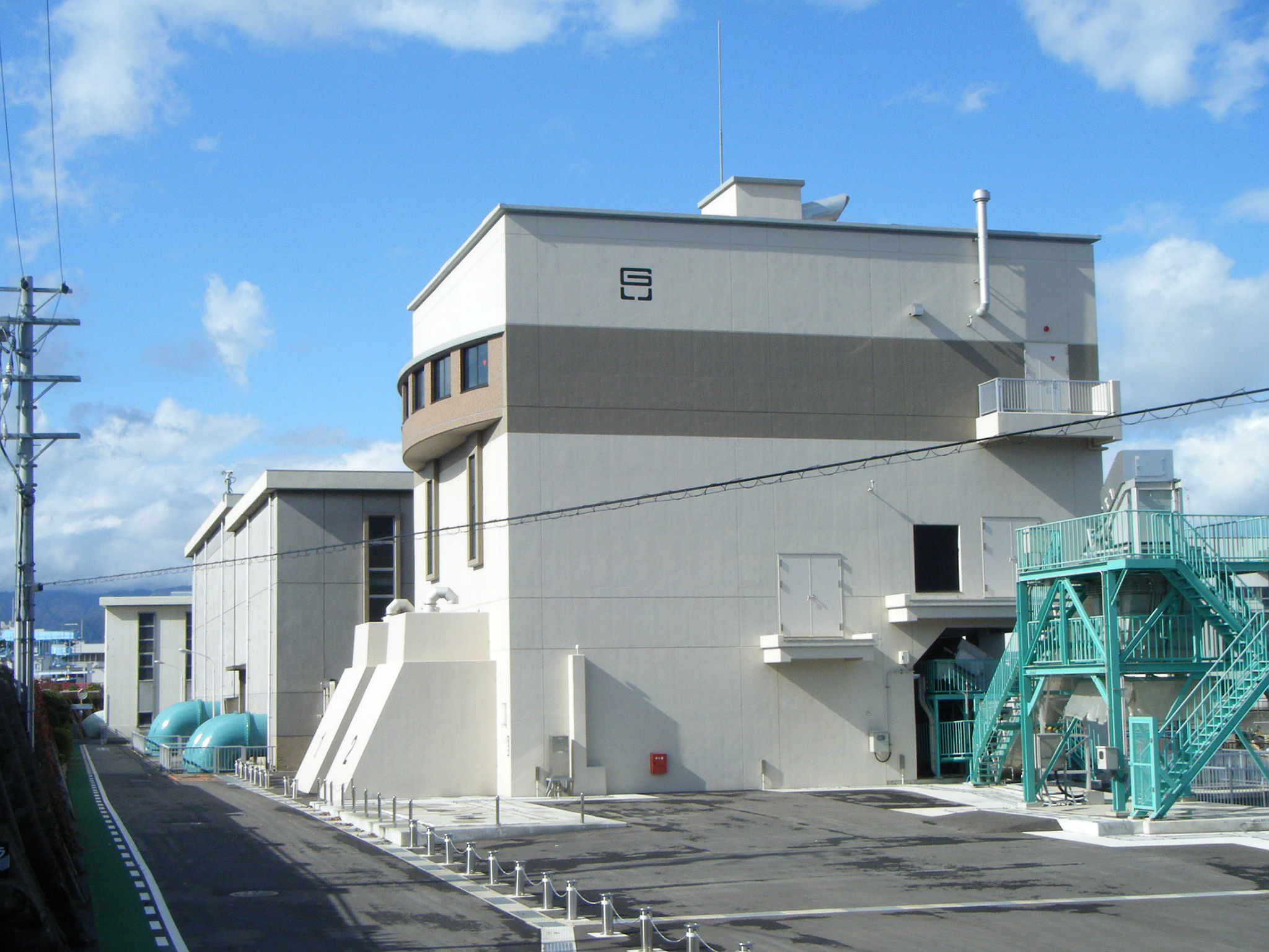 尼崎市臨海部 東浜排水機場